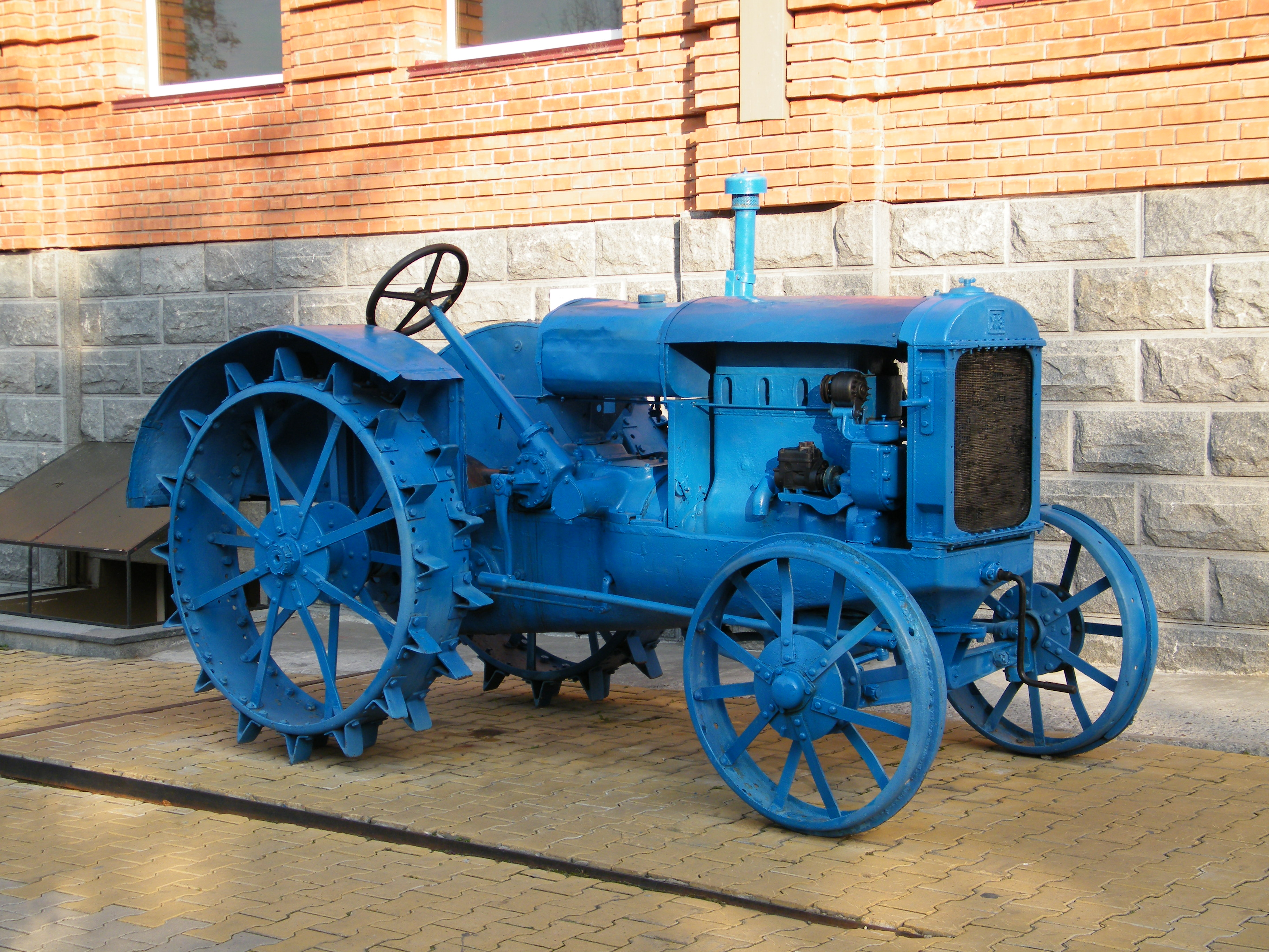 Трактор СХТЗ 15-30 в Хабаровске.